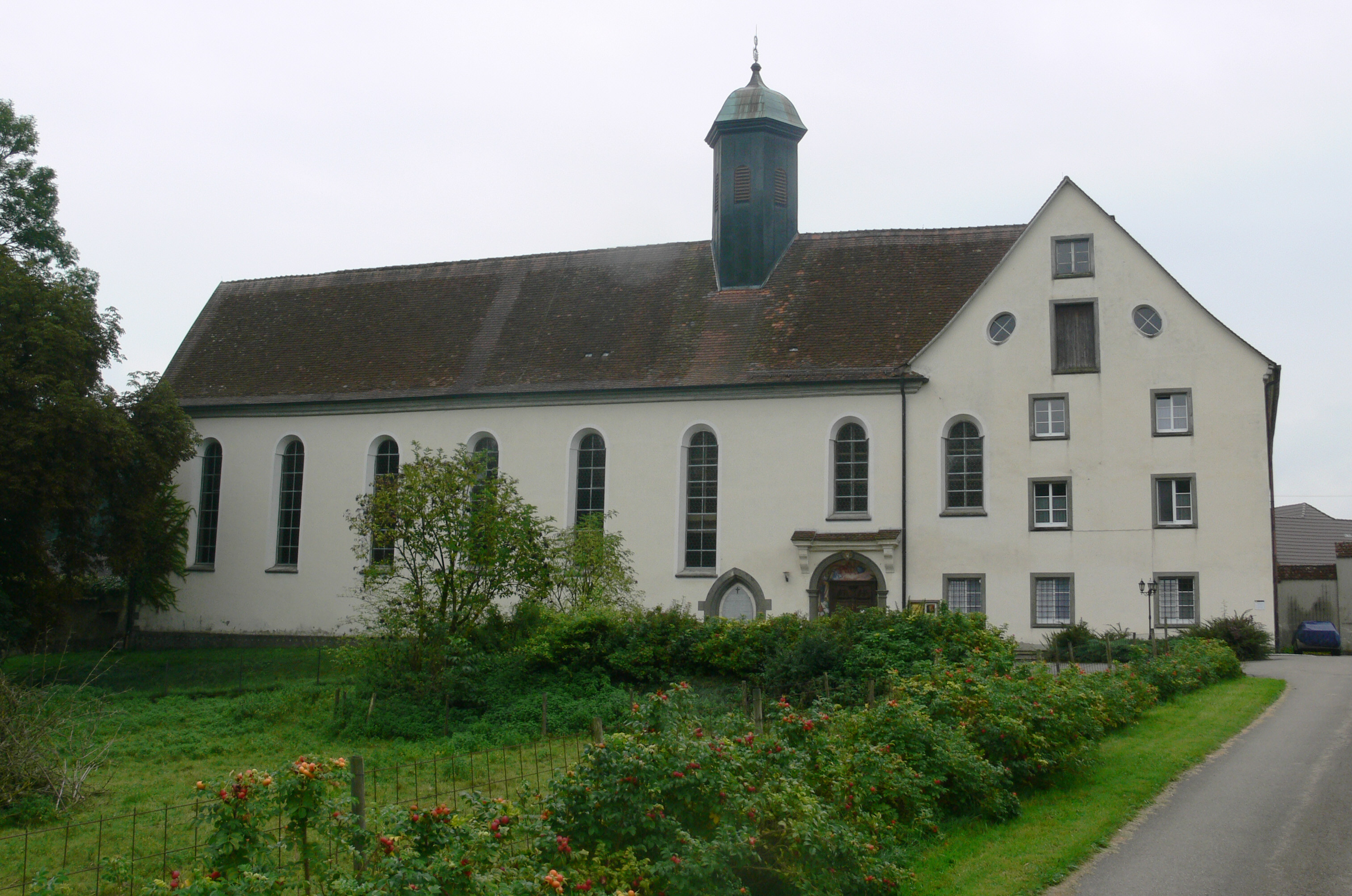 Kloster Habsthal, Gemeinde Ostrach, Landkreis Sigmaringen